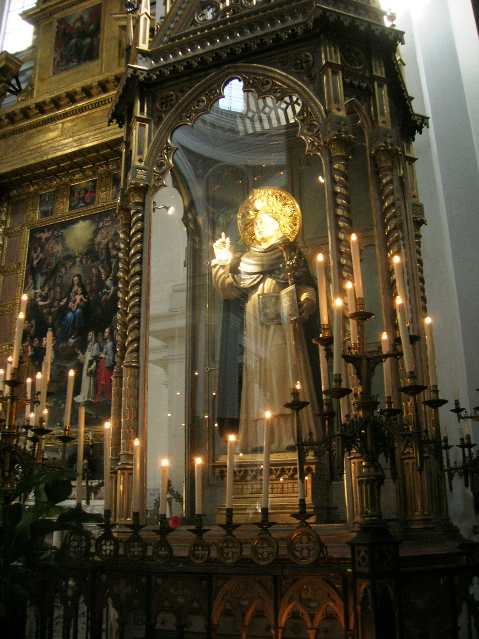 Basilica di Santa Maria della Sanità